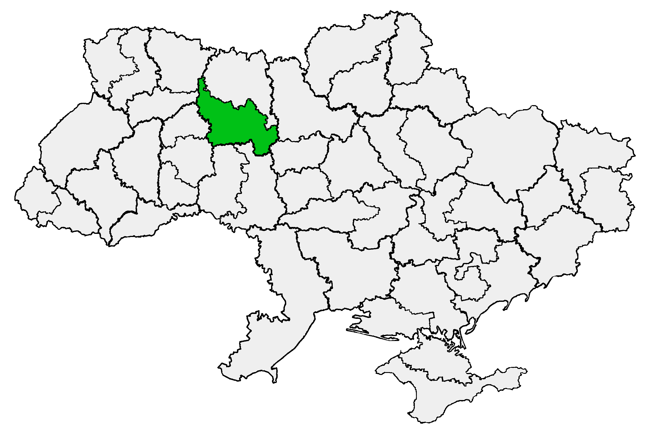 Житомирська єпархія УПЦ(МП)